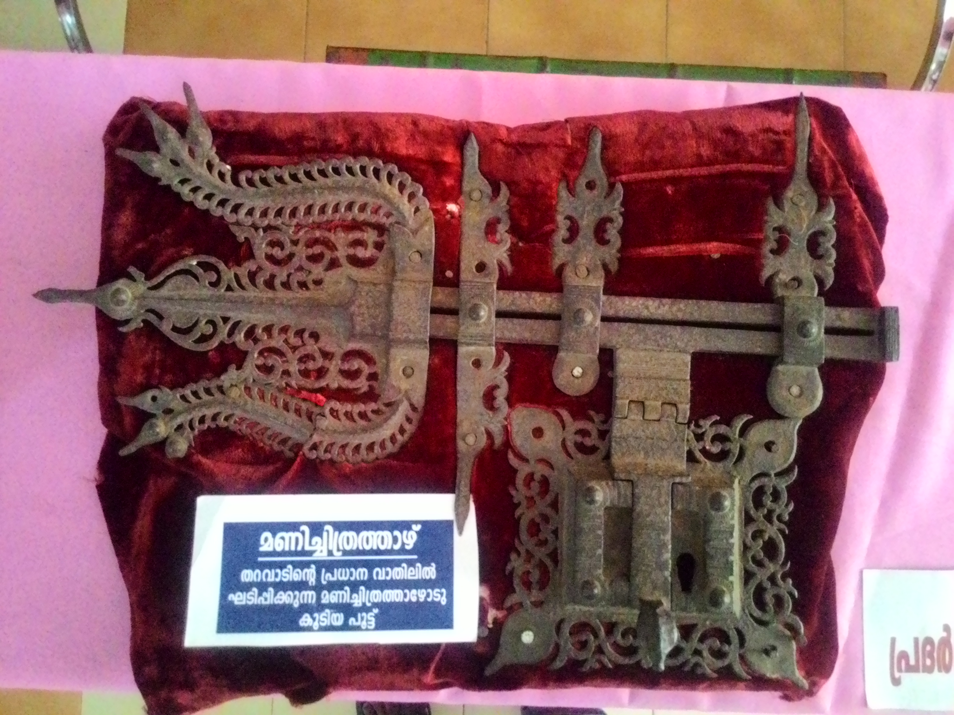 Kerala Lock